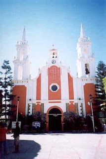 La entrada de la iglesia Señor Santiago Apóstol en la ciudad de Zumpango del Río en un día soleado junto con el atrio.